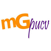 Logo del Movimiento Gremial de la Pontificia Universidad Católica de Valparaíso